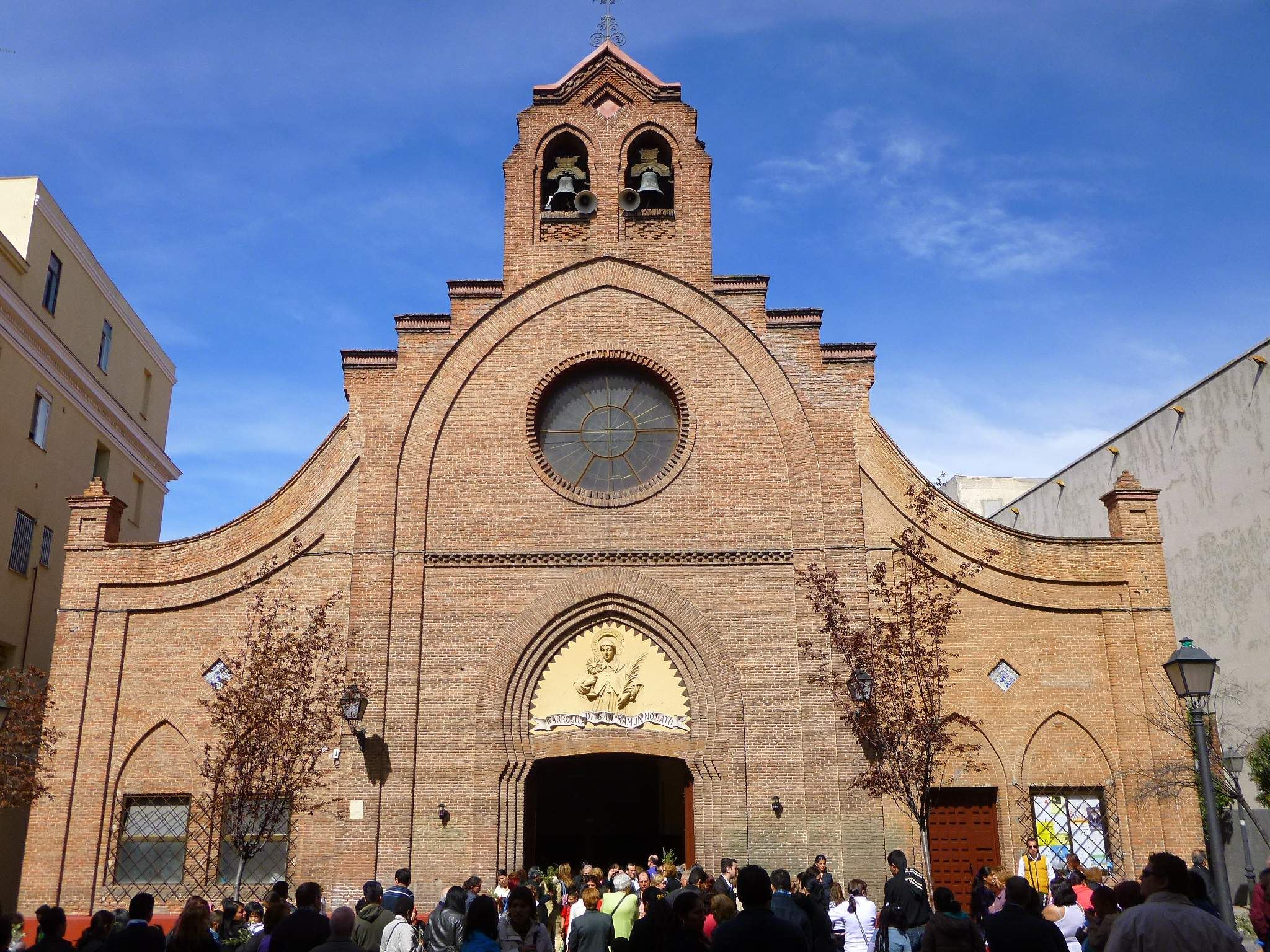 Iglesia de San Ramón Nonato, en Puente de Vallecas, Madrid